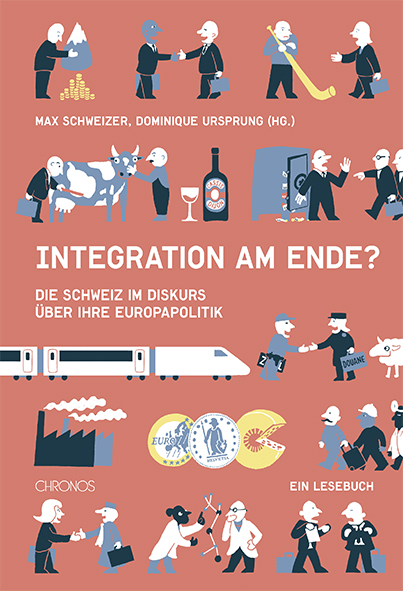 Schweizer, Ursprung (Hg), Integration am Ende?, Umschlagbild von Tomas Fryscak (